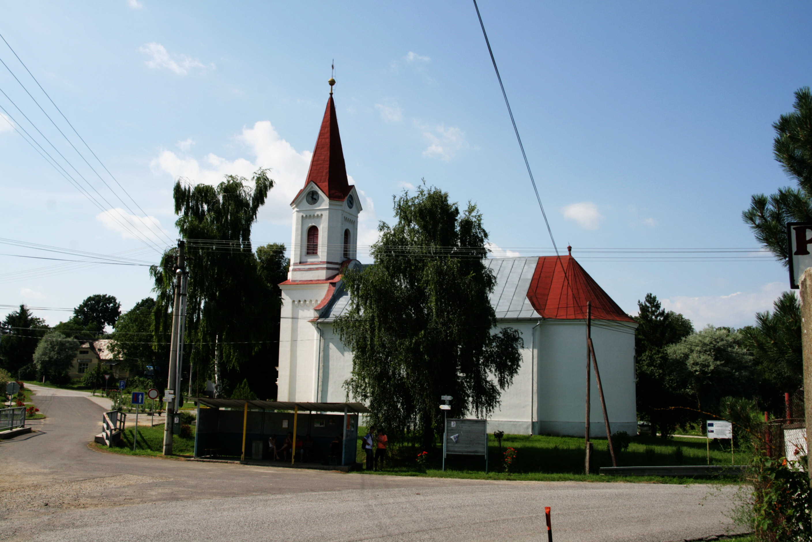 Balogpádár - evangélikus templom